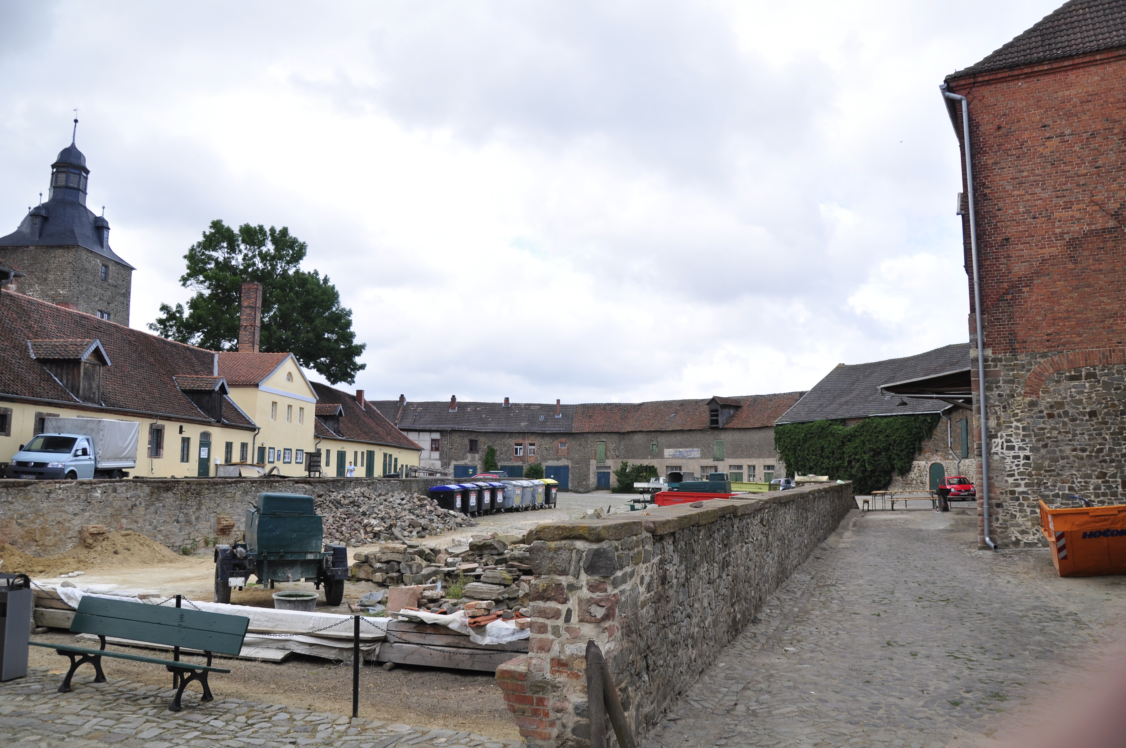 Wirtschaftshof Hundisburg